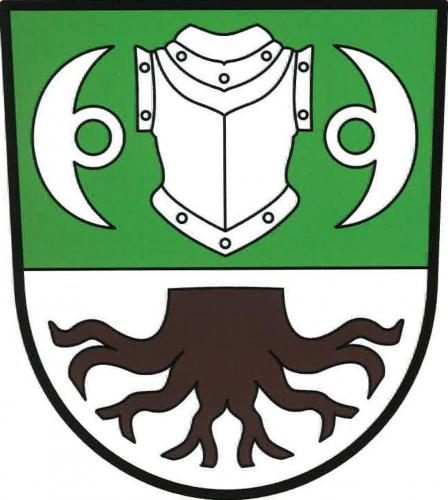 znak, Brnířov, okres Domažlice